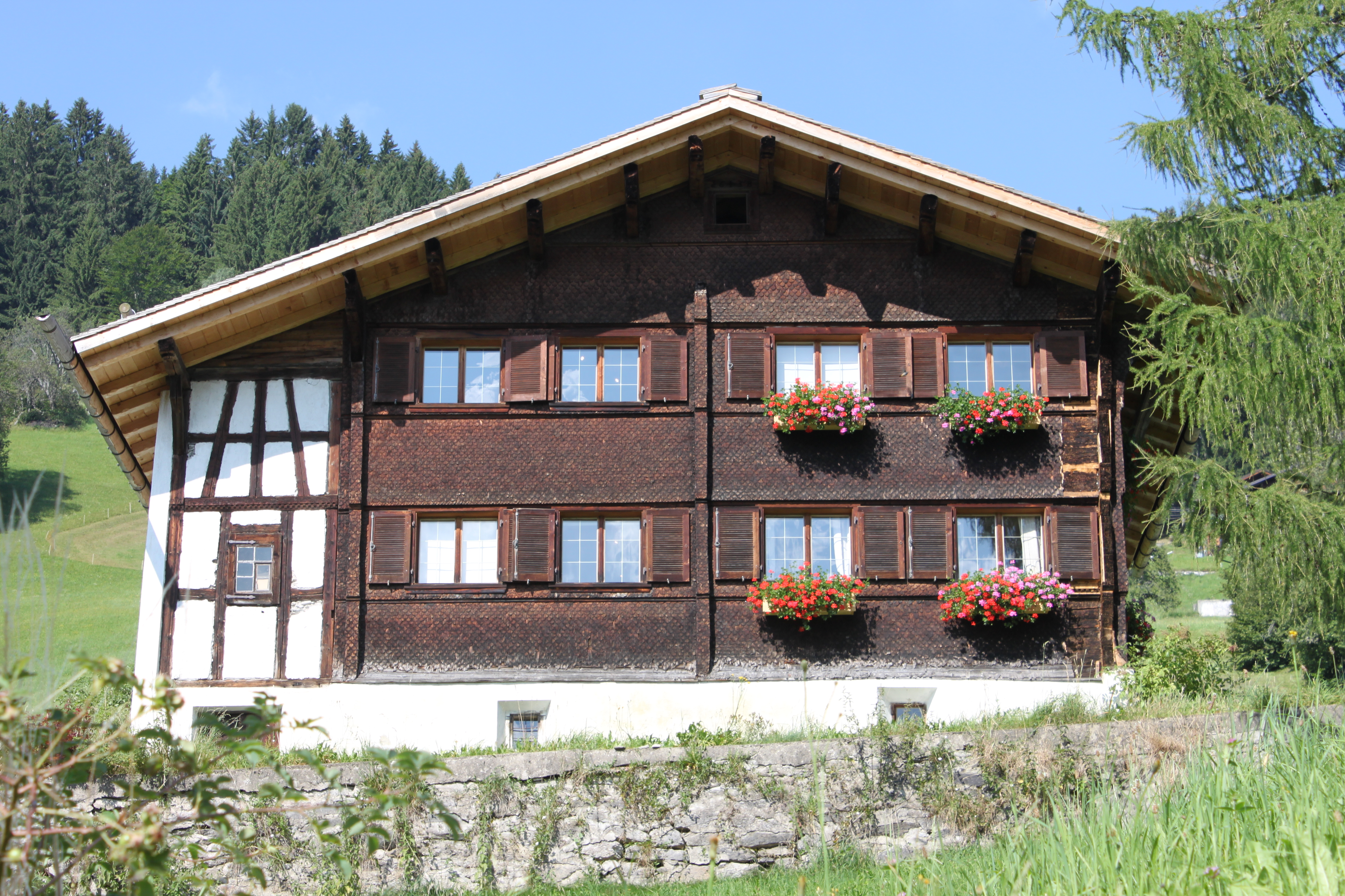 Frühmesshaus Bartholomäberg, talseitige südseitige Hauptfassade